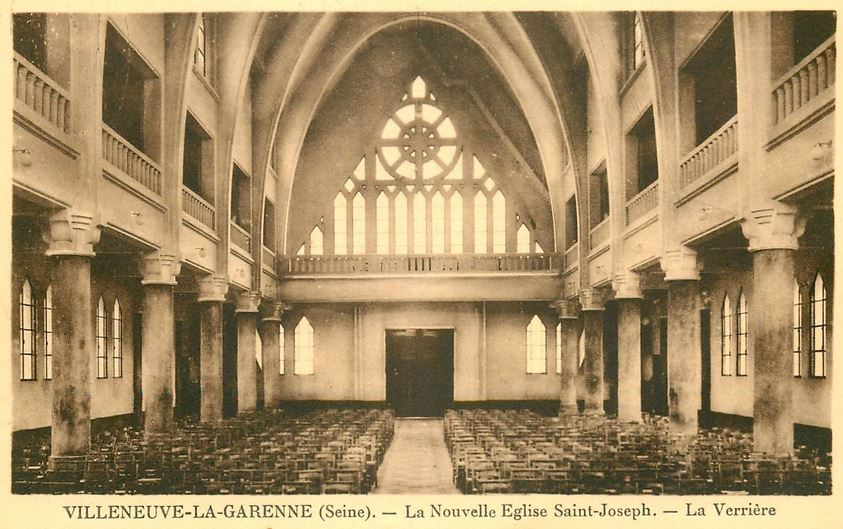 Villeneuve-la-Garenne. Eglise-Saint-Joseph en 1935